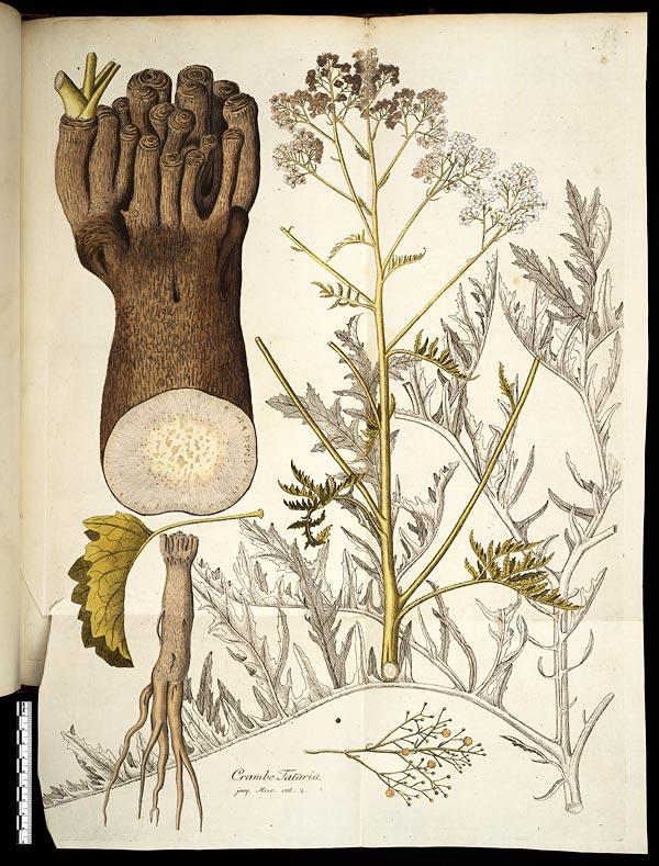 Crambe_tataria.jpg katrán tatarský z